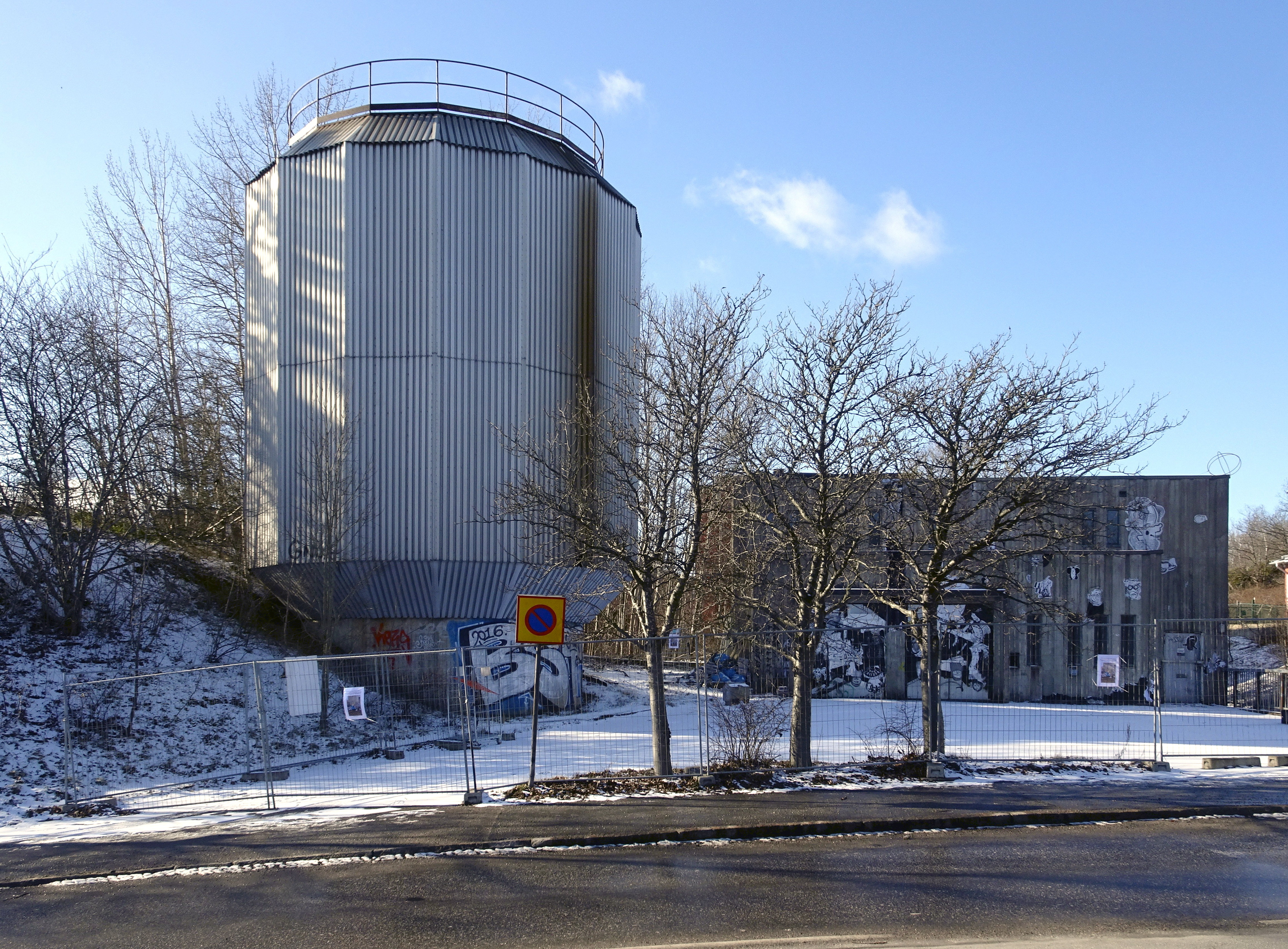 Konsthallen Kummelholmen, Vårberg, f.d. panncentral, Familjebostäder AB (Byggherre), HSB Riksförbund Arkitektkontor (Arkitektkontor), Ingmar Benckert (Arkitekt), Jean Ericson (Byggmästare), SIAB (Byggmästare)